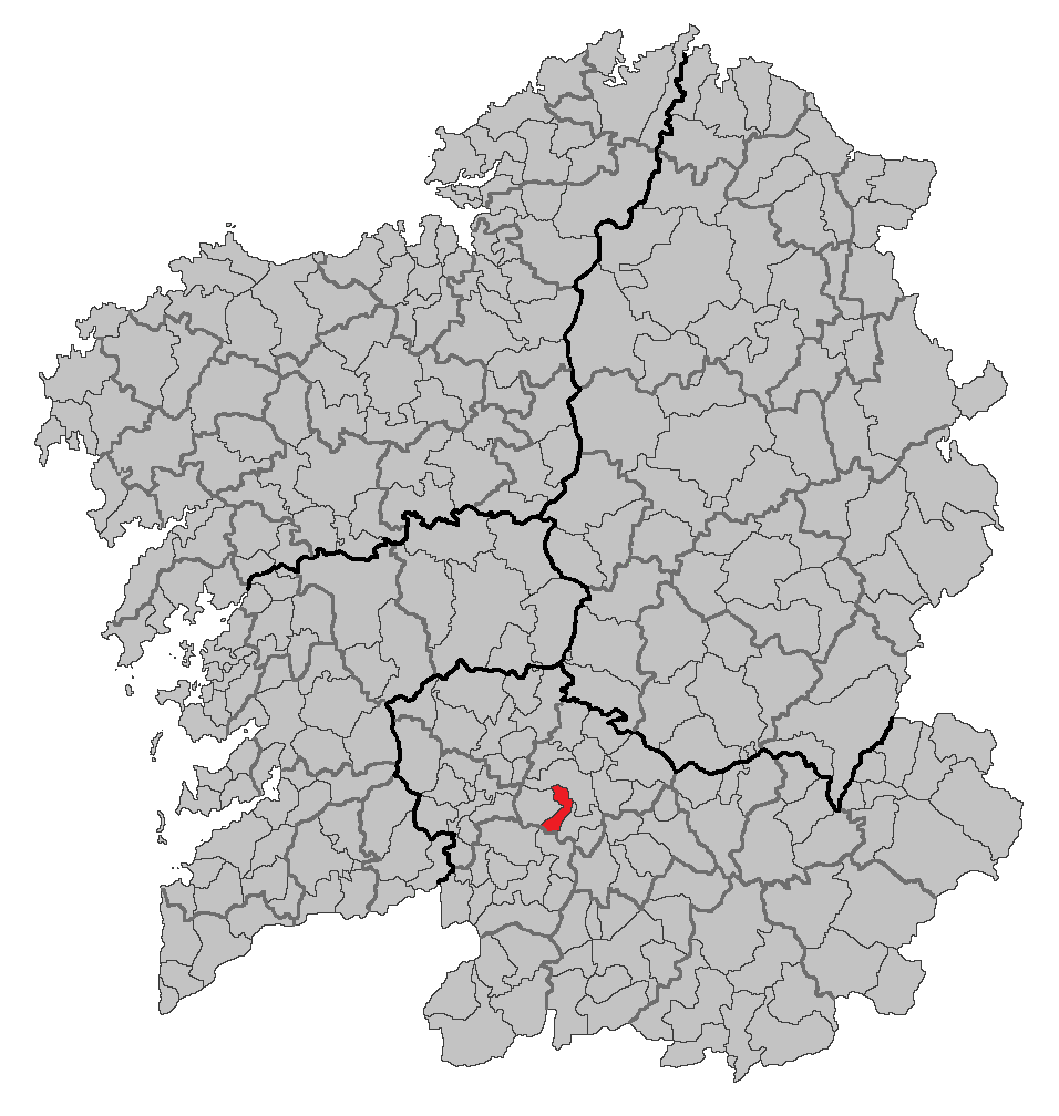 Mapa coa localización do concello de Barbadás.